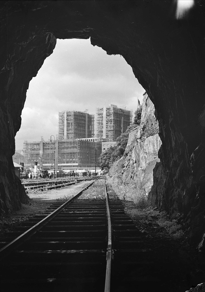 Det uferdige Rådhuset i Oslo sett fra Havnebanetunellen i 1935.